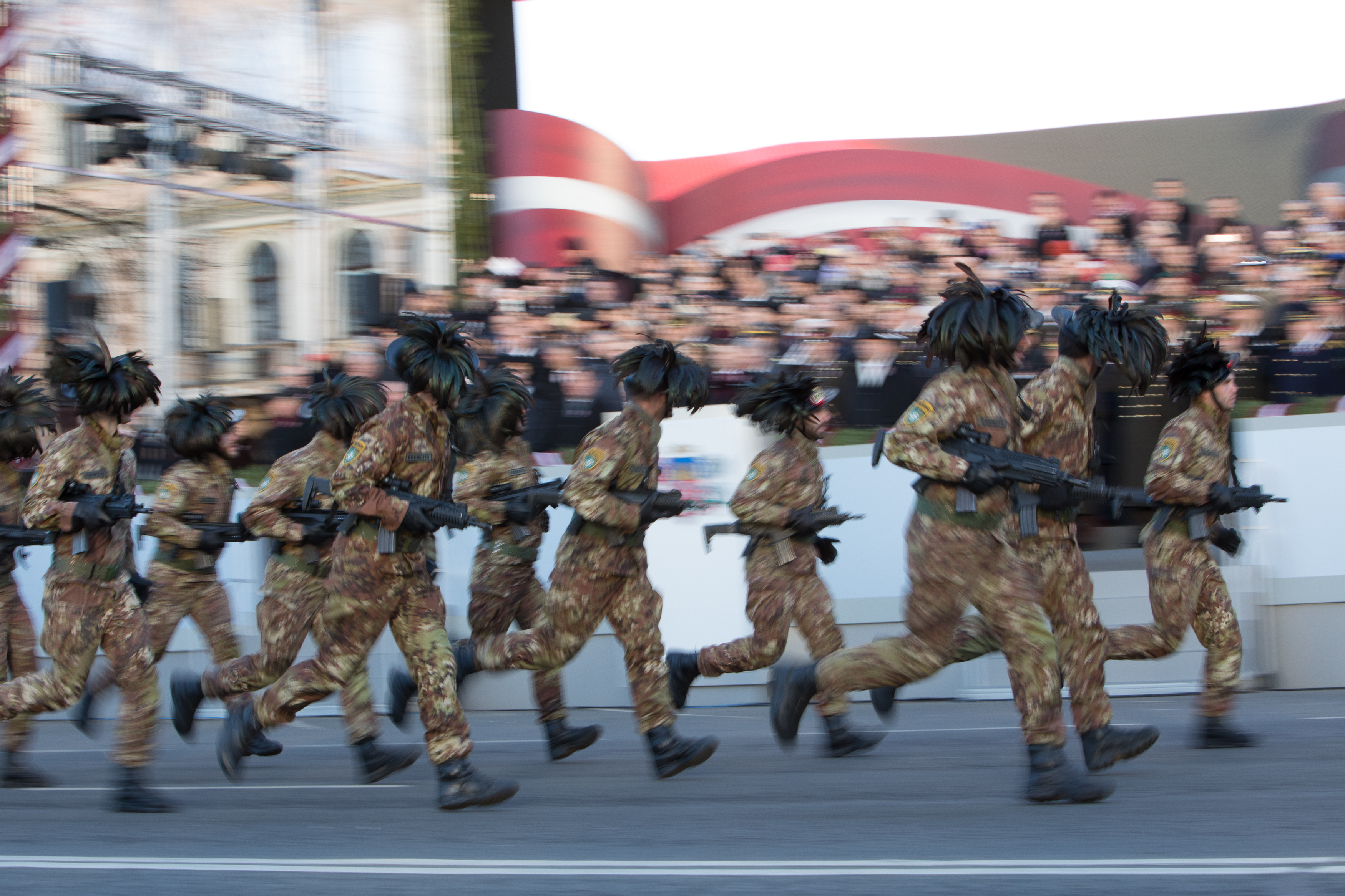 2018.gada 18.novembris. Nacionālo bruņoto spēku vienību militārā parāde 11.novembra krastmalā. Foto: Ernests Dinka, Saeima Izmantošanas noteikumi: saeima.lv/lv/autortiesibas